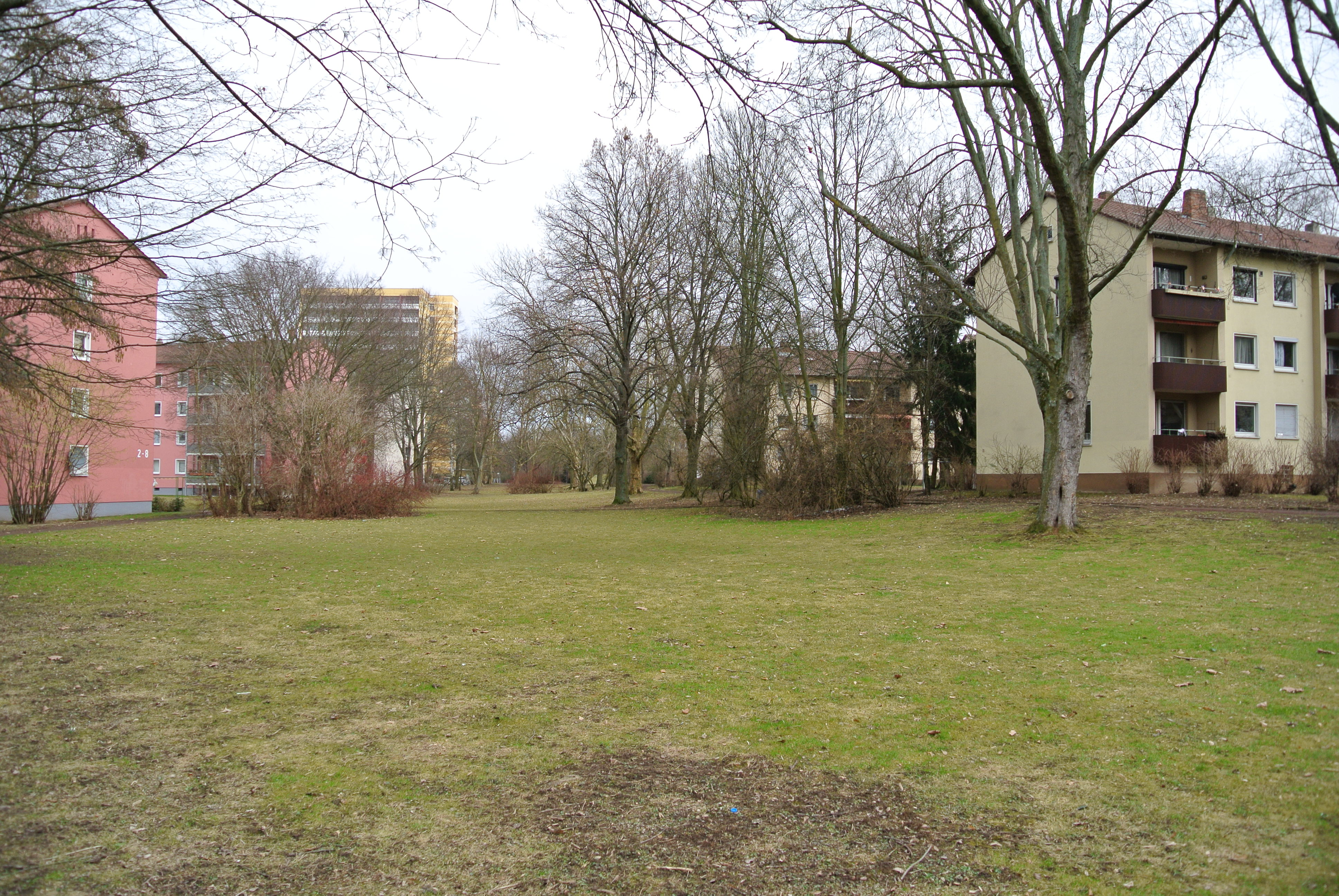 zentraler Grünzug der Siedlung, nach Osten geblickt